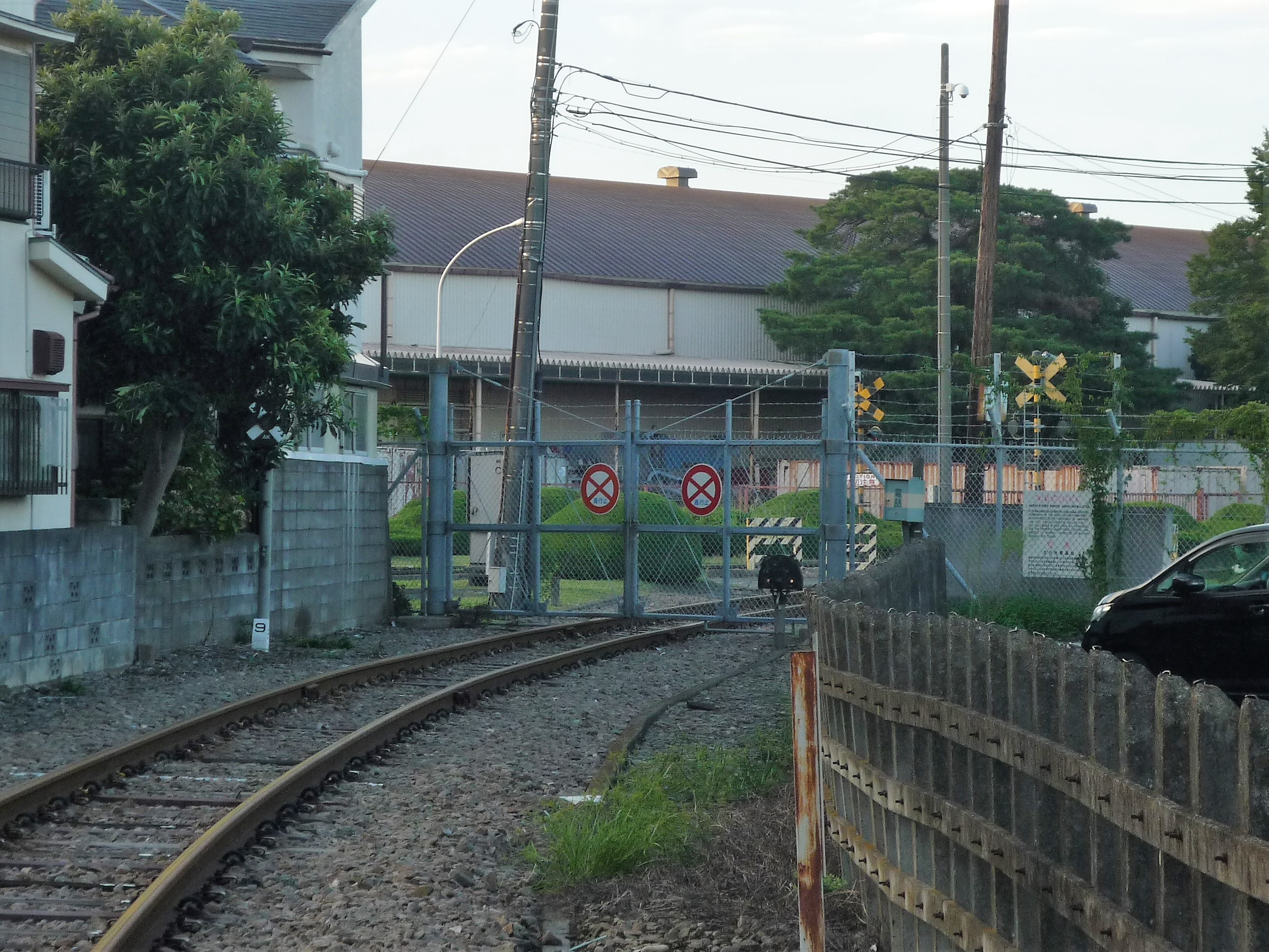 横田基地専用線 基地へのゲート